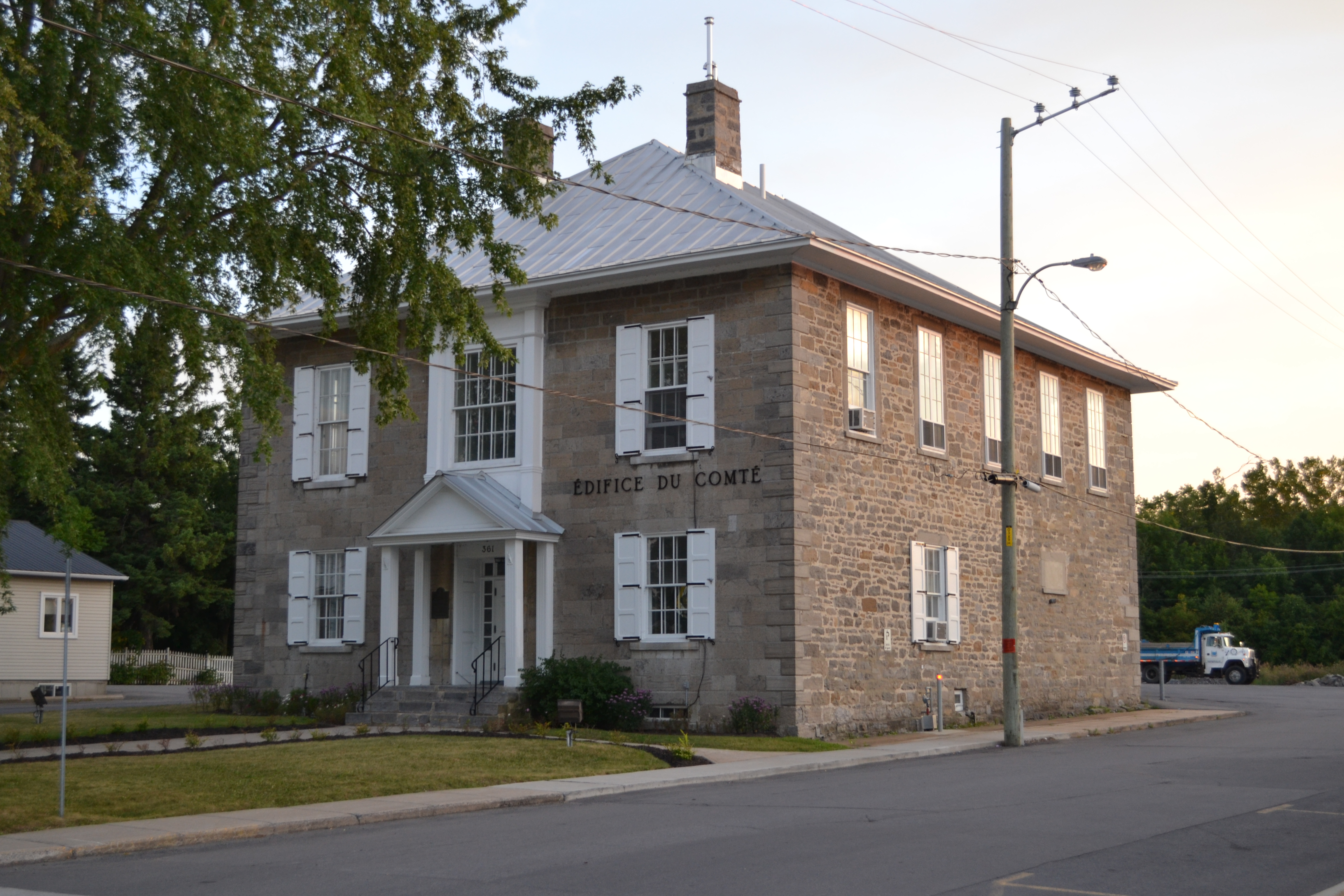 Le palais de justice de Napierville est un édifice d'inspiration palladienne érigé en 1834.